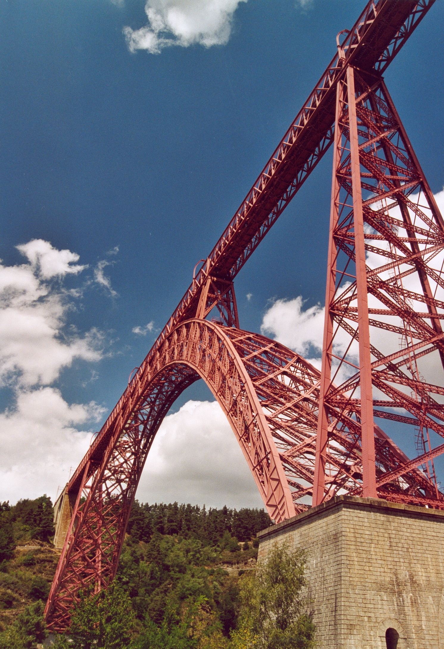 France Cantal Viaduc de Garabit